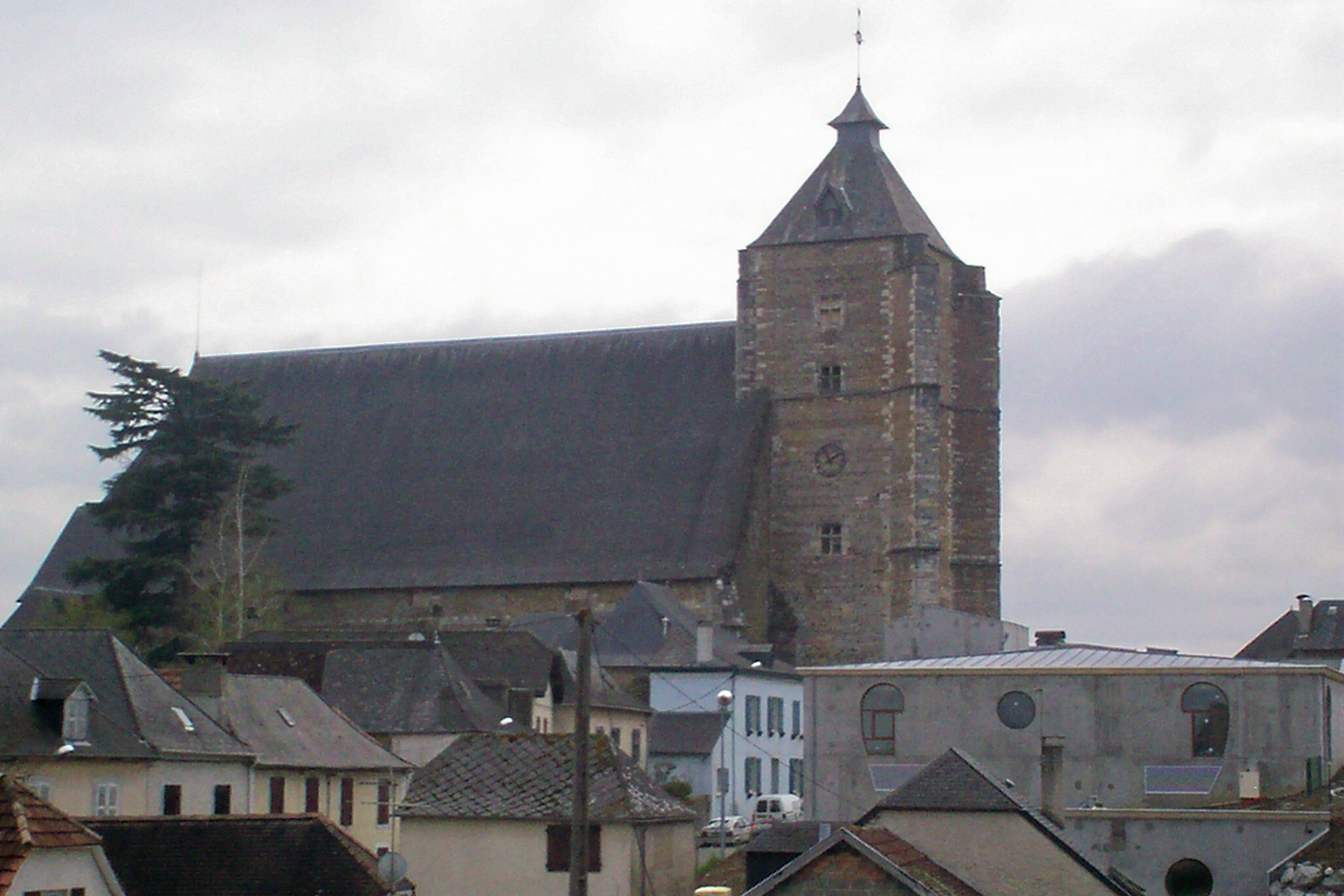 La glèisa de Monenh dab lo son tèit deu hustatge en forma de "vaisheth capvirat"